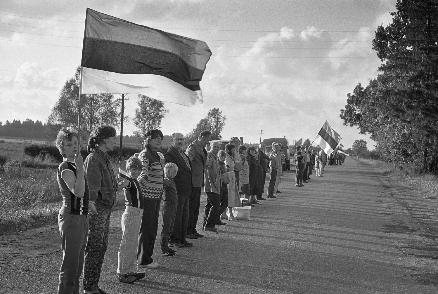 Balti kett 22